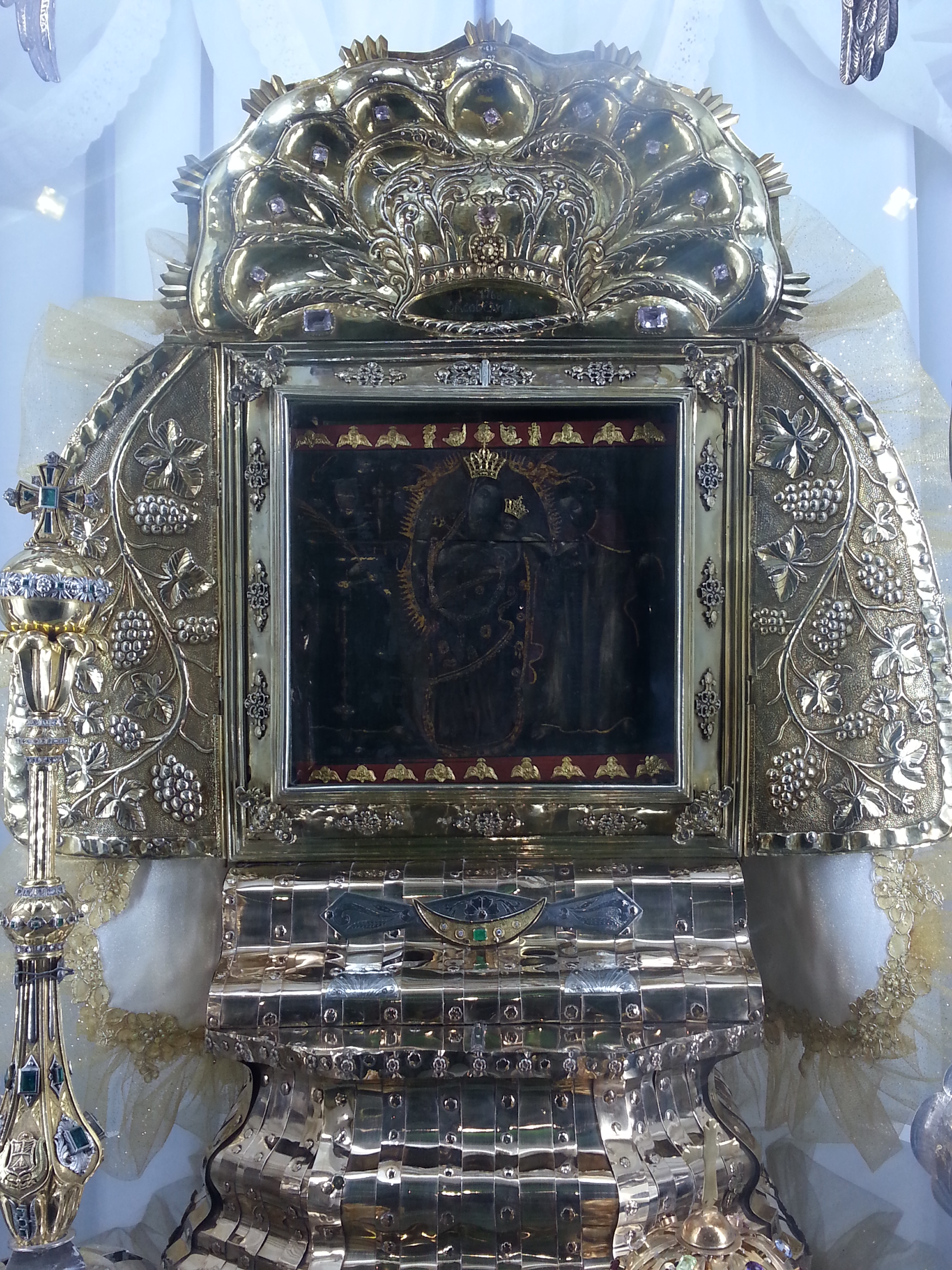 Foto tomada en la Basílica de Nuestra Señora de Chiquinquirá a la tabla original en la cual refleja a la Virgen y el Niño junto a San Antonio y San Andrés.